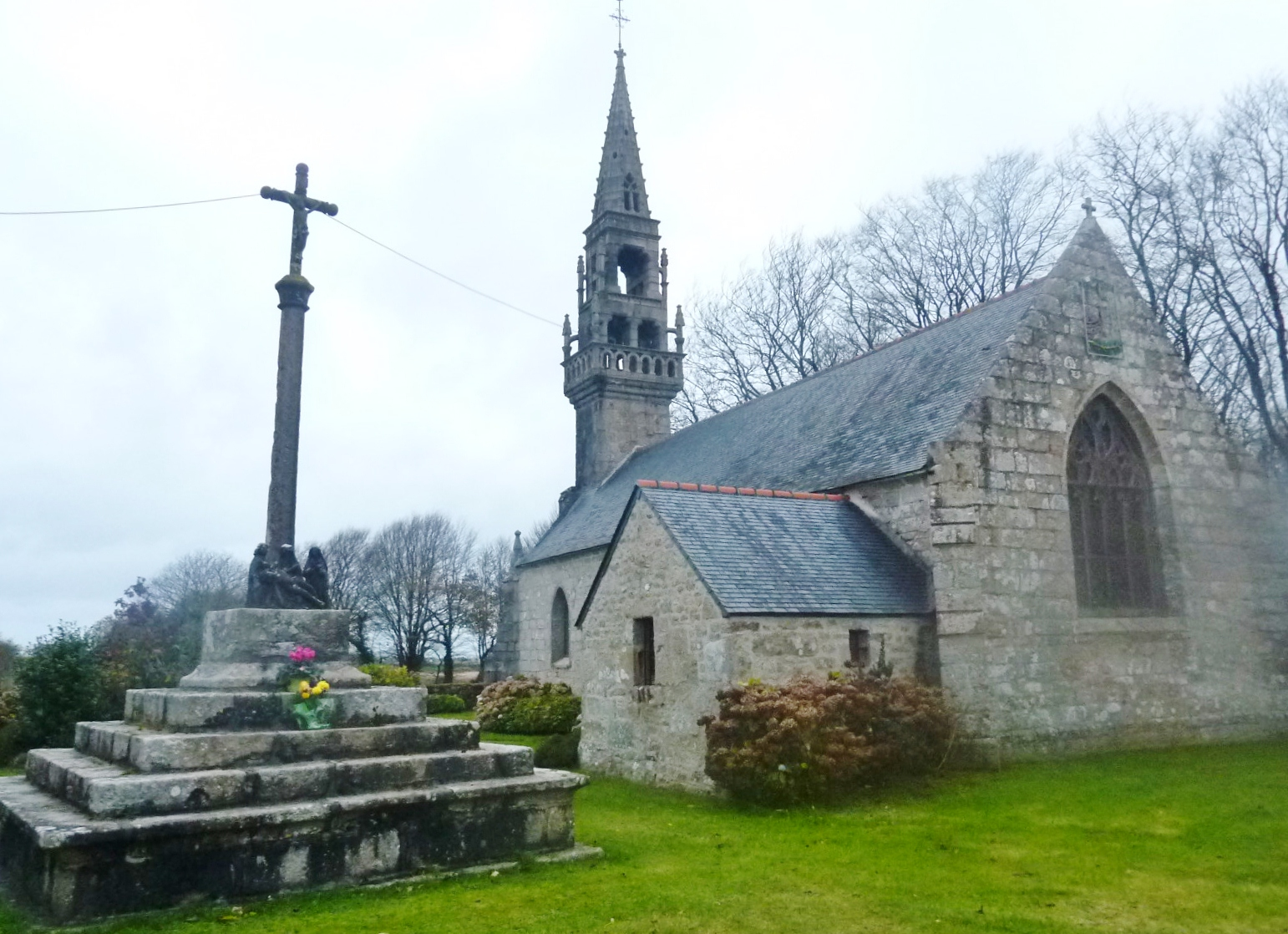 Ploudaniel : la chapelle Saint-Eloi (en fait confusion avec saint Alar). Elle date du XVIème siècle et un important pèlerinage de chevaux s'y tenait. La chapelle est située à l'extrémité sud de la commune de Ploudaniel, aux portes de Landerneau